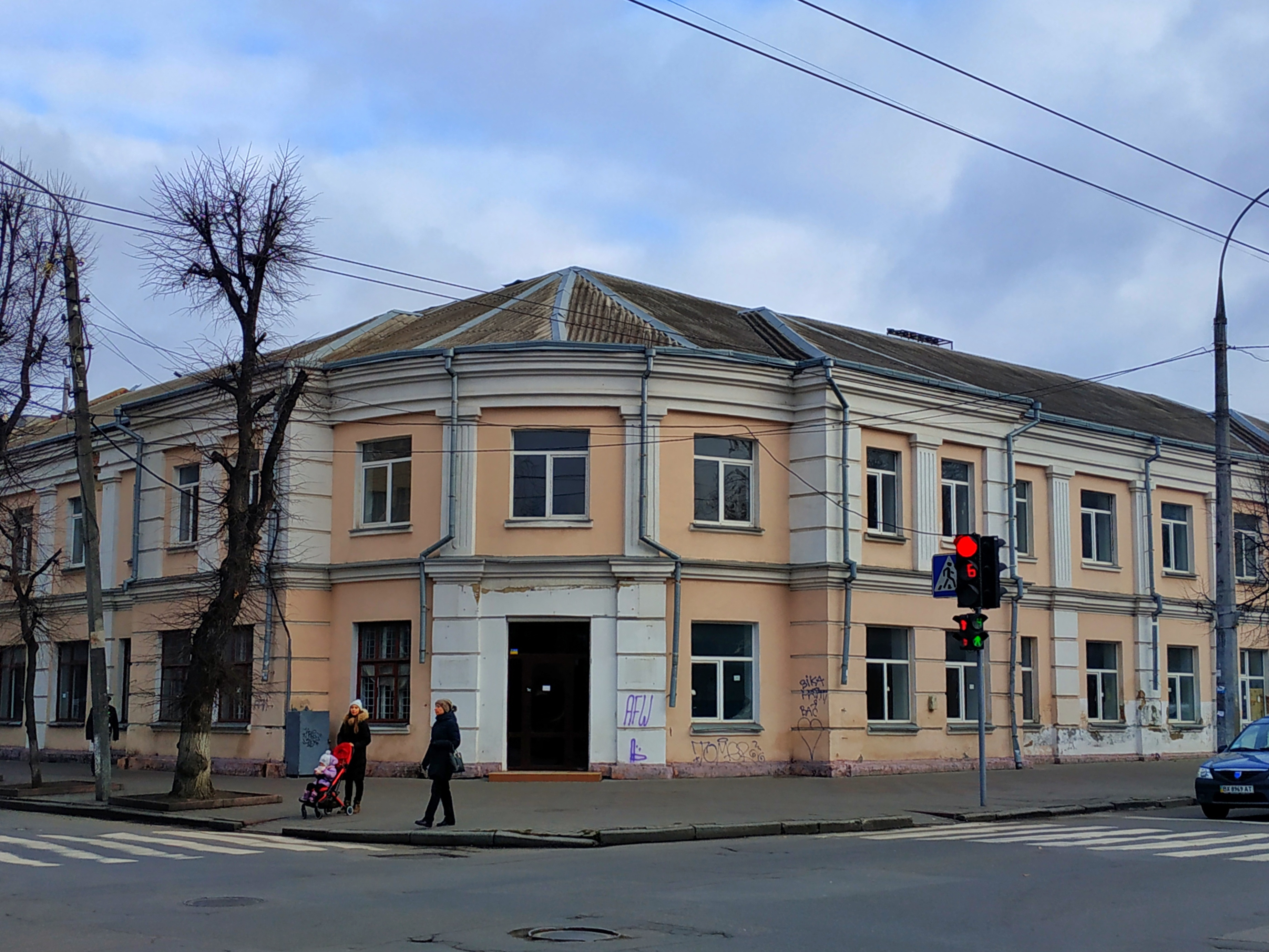 Двоповерховий будинок, споруджений наприкінці 1930-х років як готель, з 1960-х років тут розташоване Музичне училище ім. Заремби.